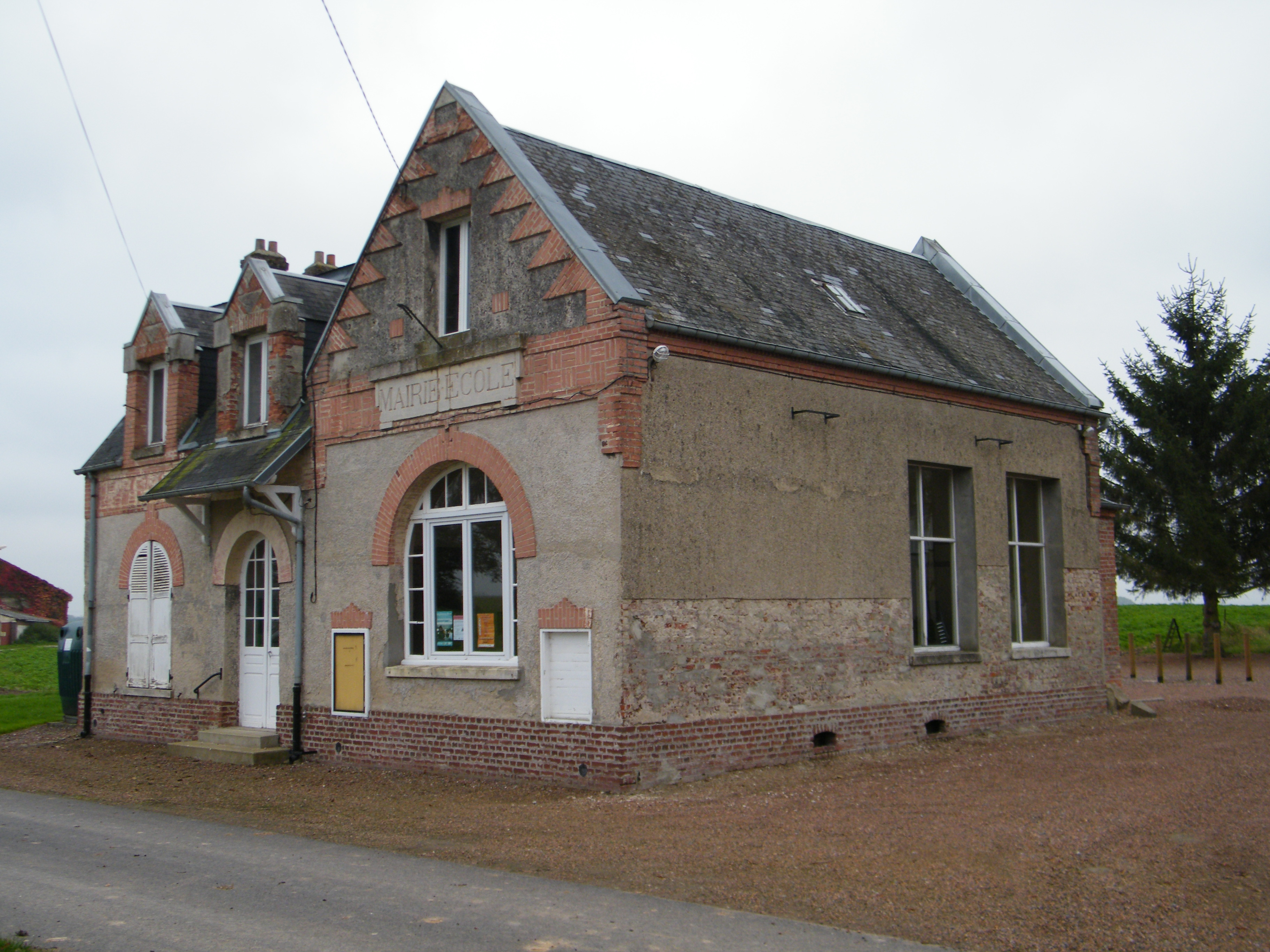 Bâtiments communaux.